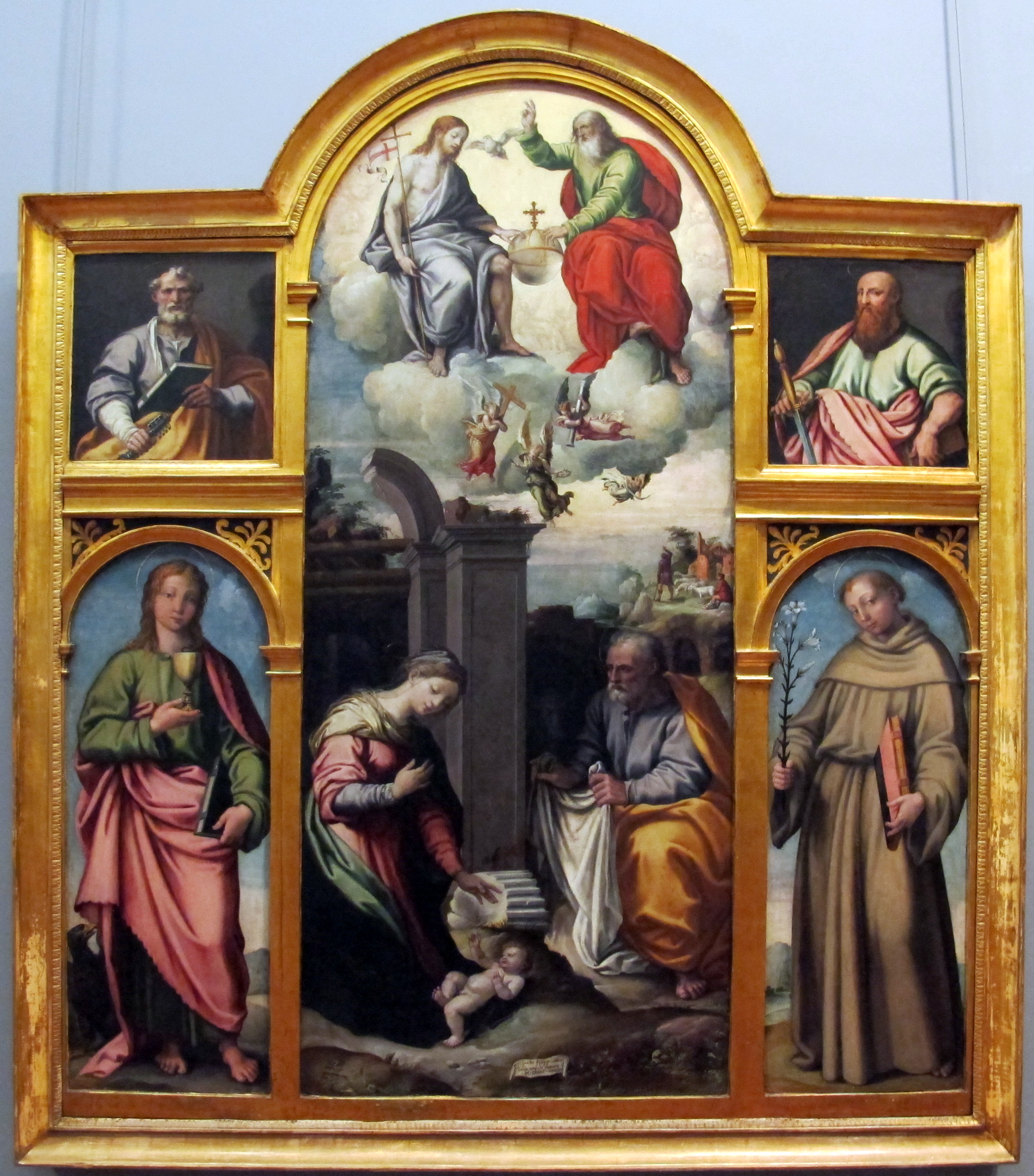 Galleria Napoletana (Museo di Capodimonte)